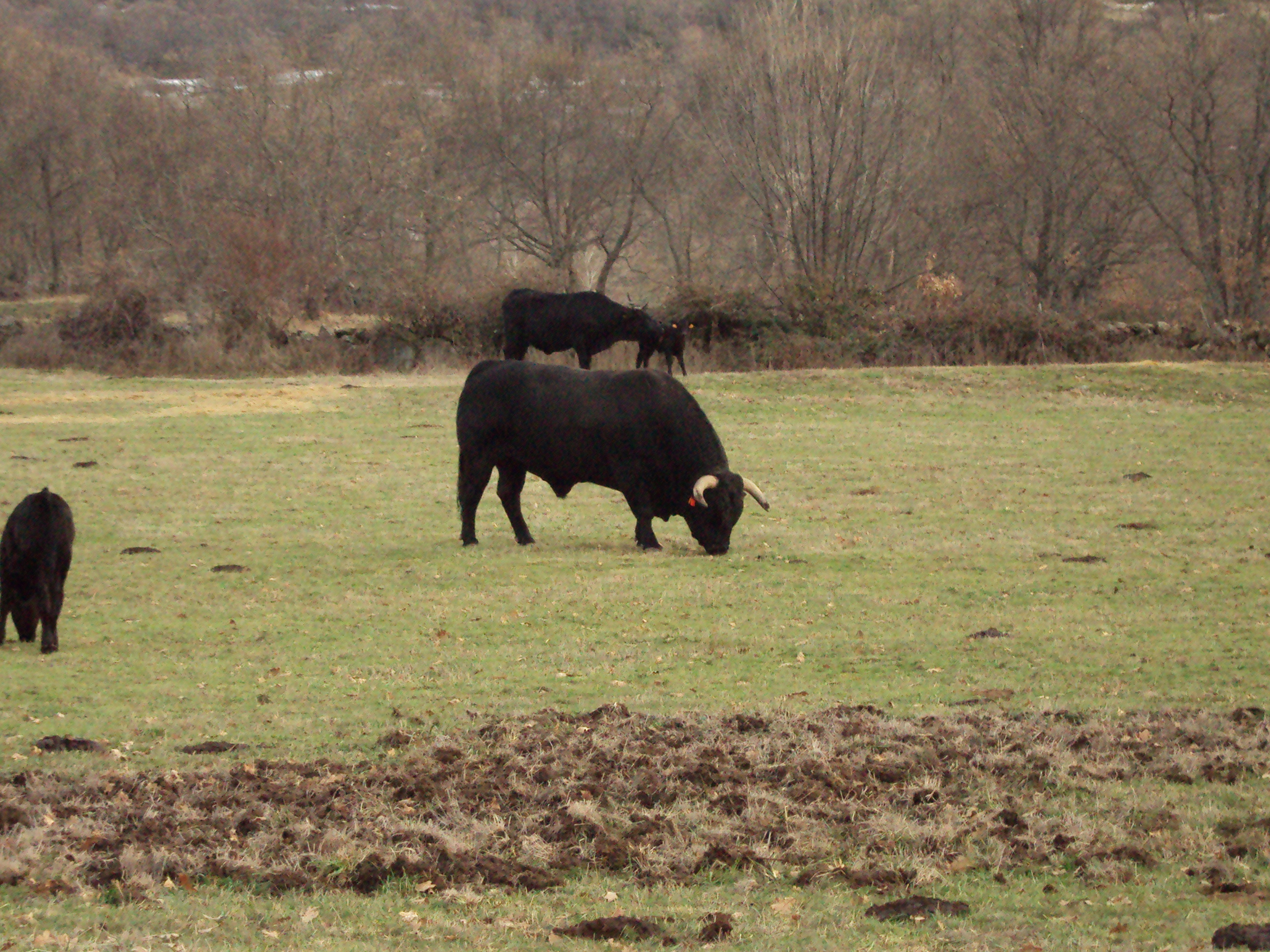 Toro de raza avileña negra ibérica (Sierra de Villafranca, provincia de Ávila, España).